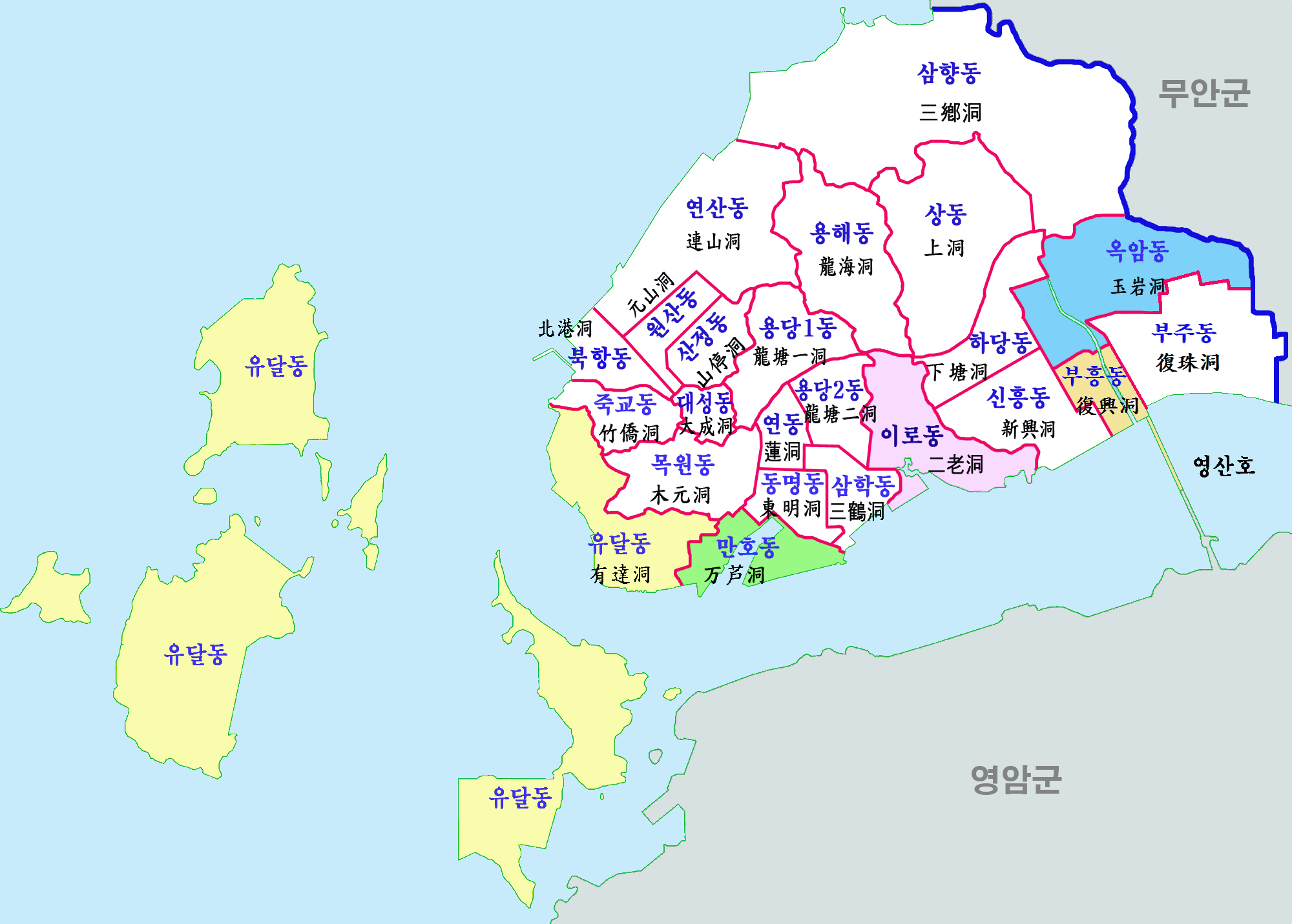 목포시 행정구역도